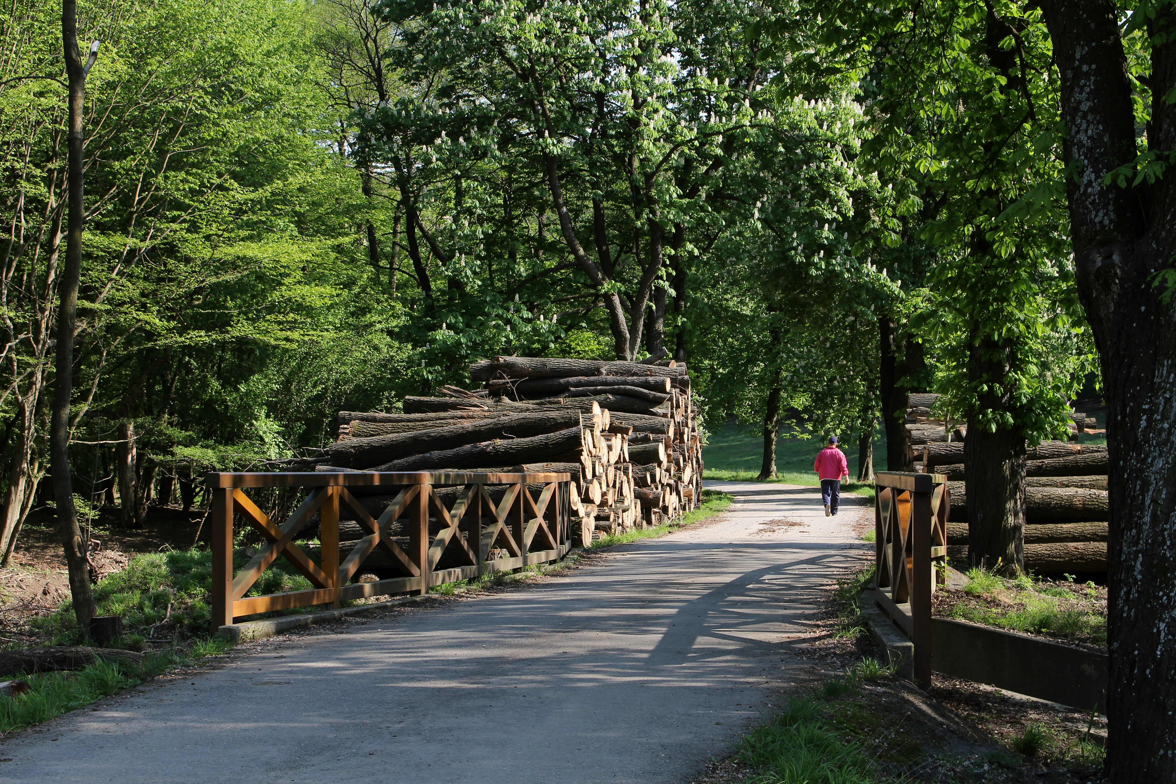 Johannserbrücke im Lainzer Tiergarten This media shows the nature reserve in Vienna with the ID 1.